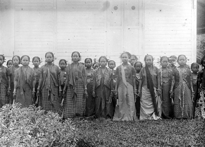 Repronegatief. Dochters van vorsten en adelijken uit Mandar, Sulawesi.